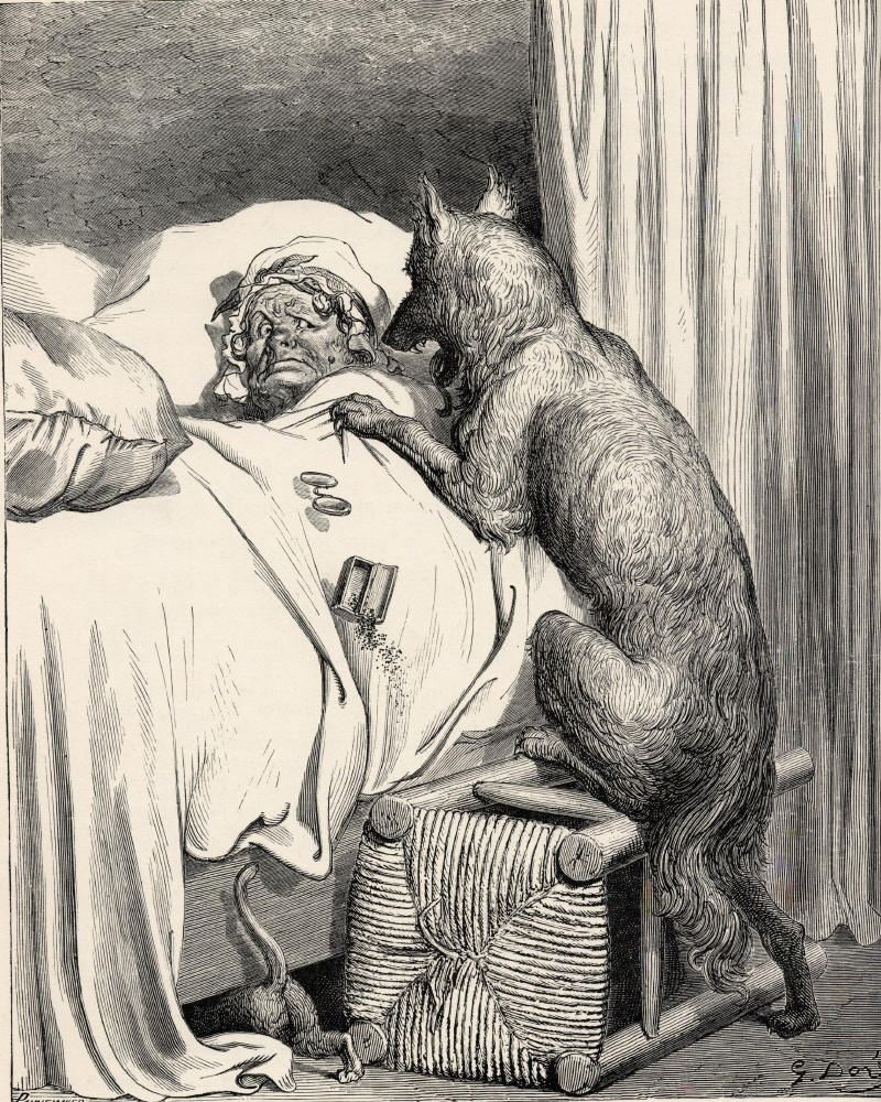 Illustration for Charles Perrault's Petit Chaperon Rouge from Histoires ou Contes du Temps passé: Les Contes de ma Mère l'Oye(1697). Gustave Doré's illustrations appear in an 1867 edition entitled Les Contes de Perrault. Second of three engravings